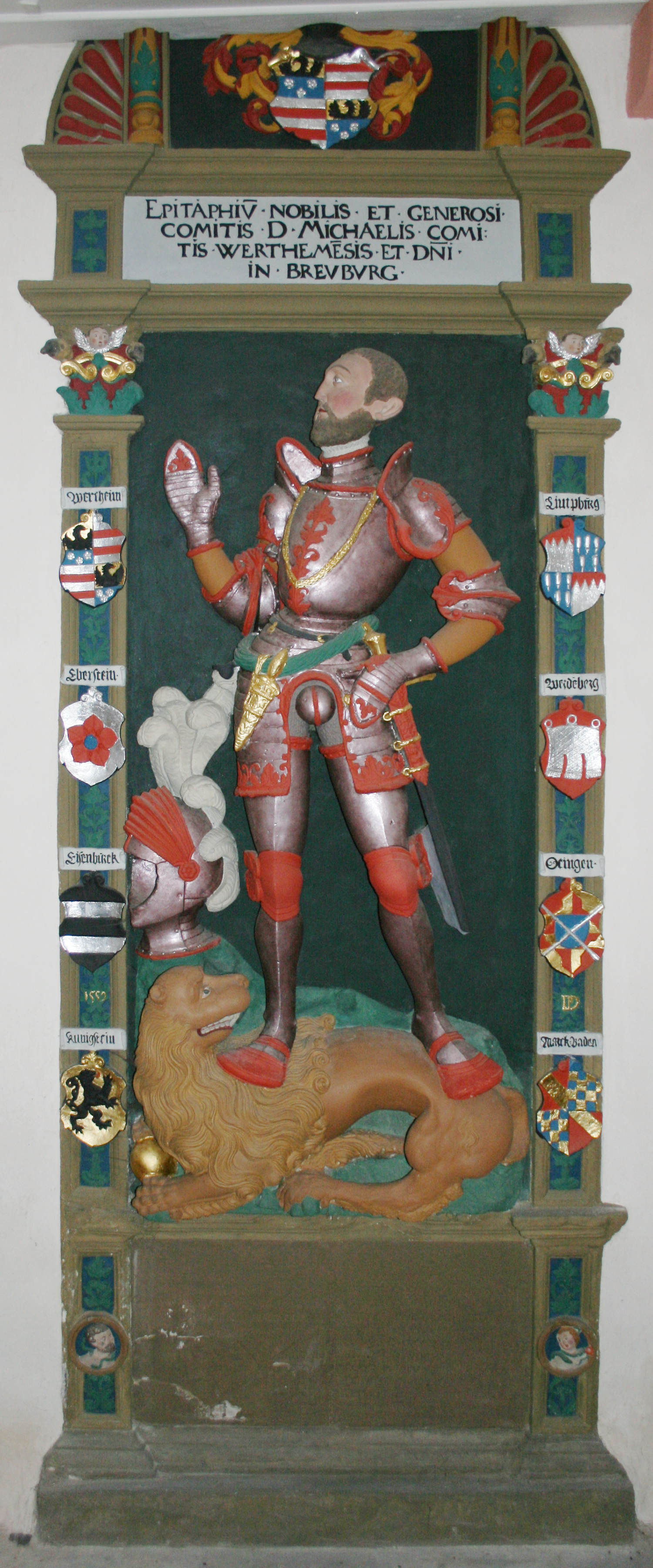 Epitaph des Grafen Michael III. von Wertheim (gest. 1556) in der Evangelischen Kirche in Breuberg-Sandbach.